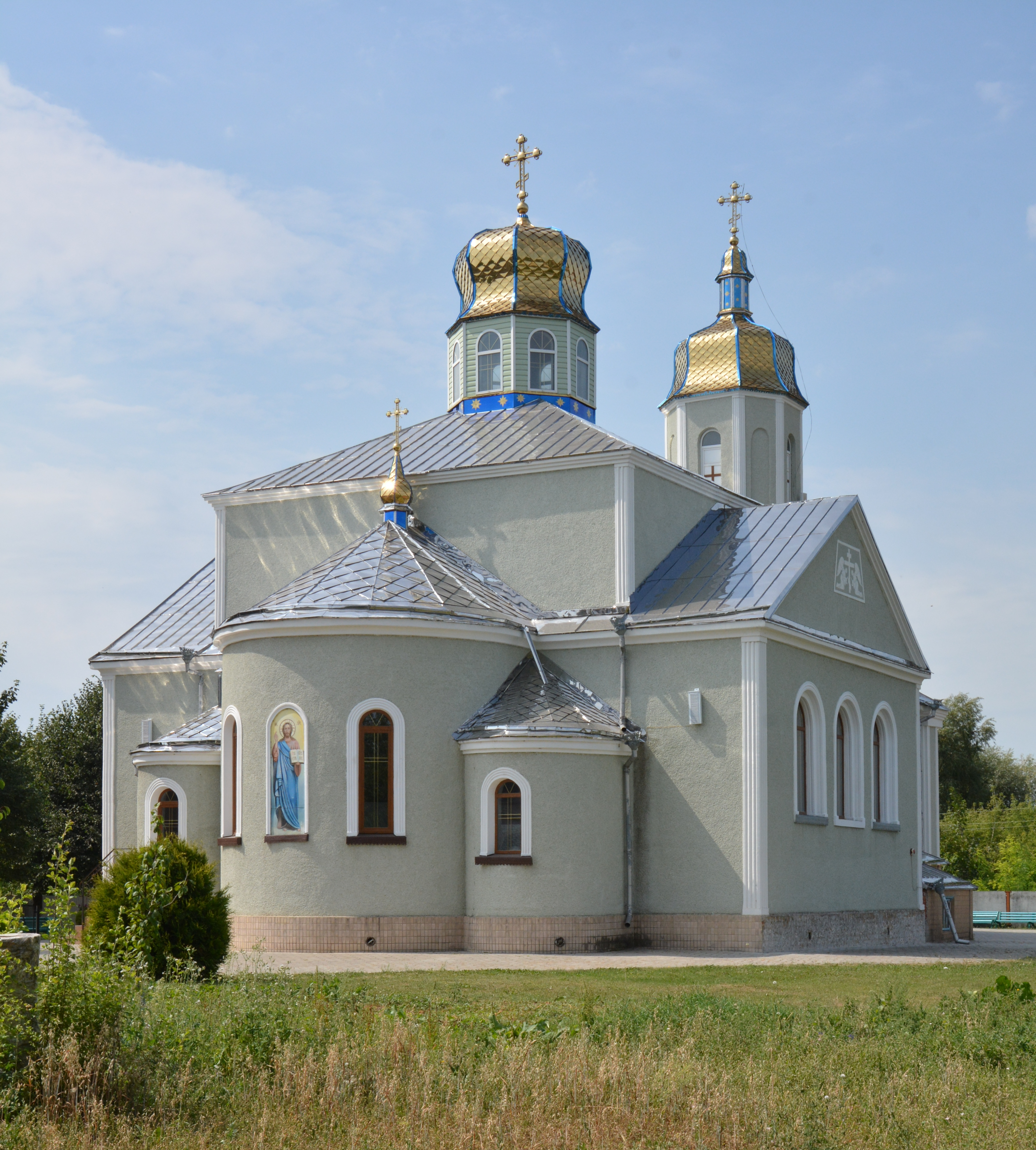 Михайлівська церква (мур.), Рожище